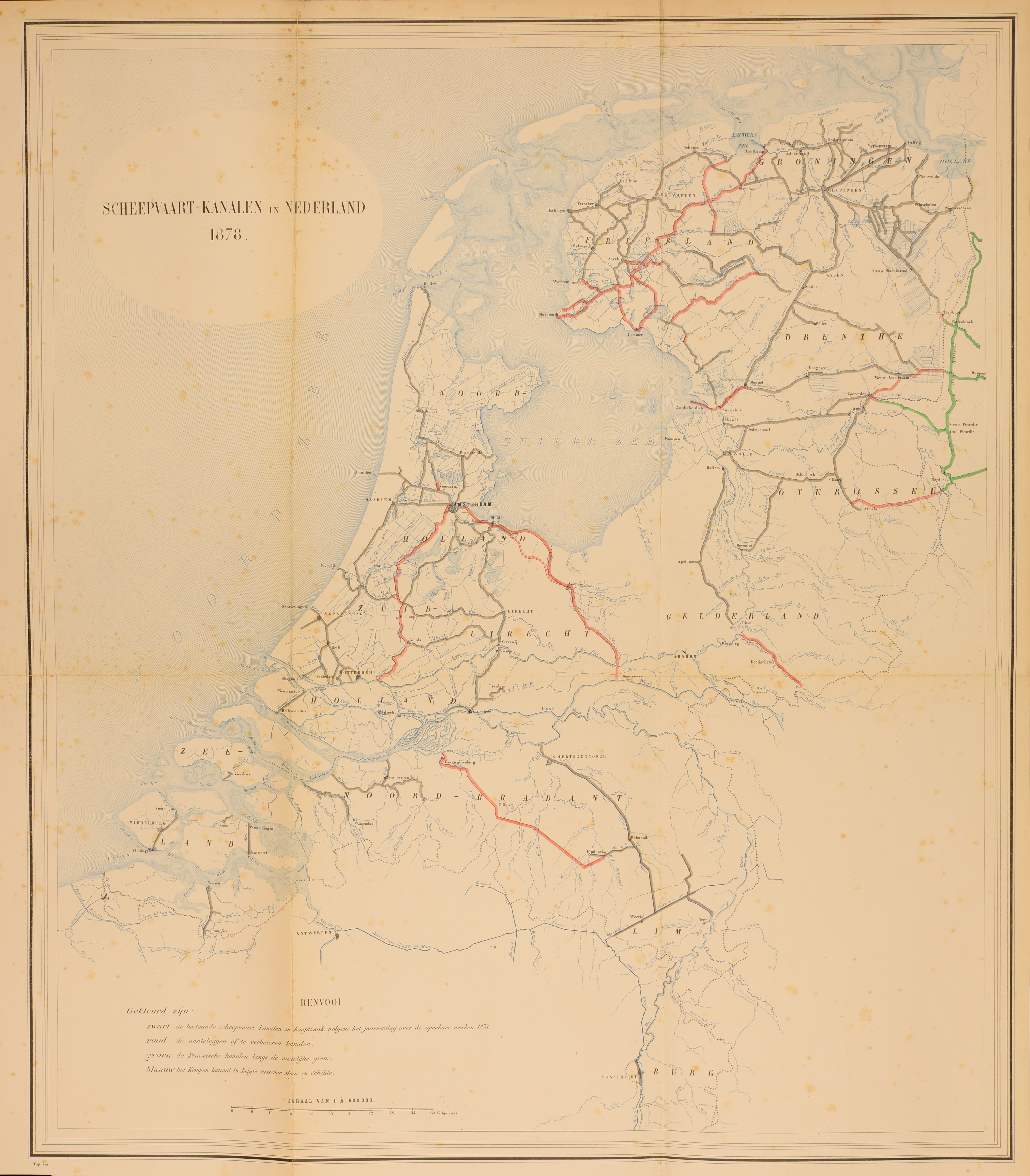 Gedrukte stukken van de Tweede Kamer der Staten-Generaal, stukken welke ten behoeve van de leden bij de behandeling in de Tweede Kamer zijn gedrukt, inventarisnummer 2277 periode 1877-1878 (130-136)